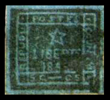 "Марка" виртуального государства Кунани